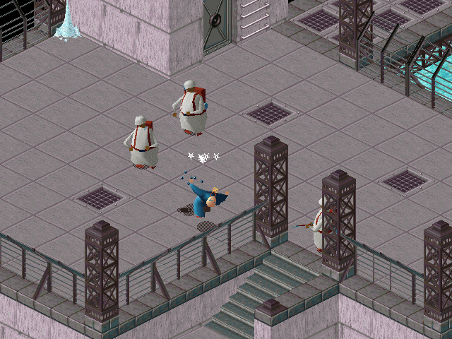 Capture d'écran du jeu vidéo Little Big Adventure (1994), développé par Adeline Software International.